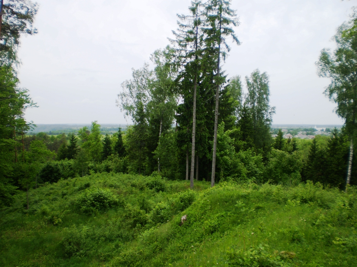 Betygalos piliakalnis, Raseinių raj.